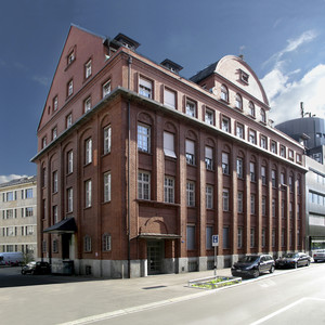 Weberstrasse_4_Zurich